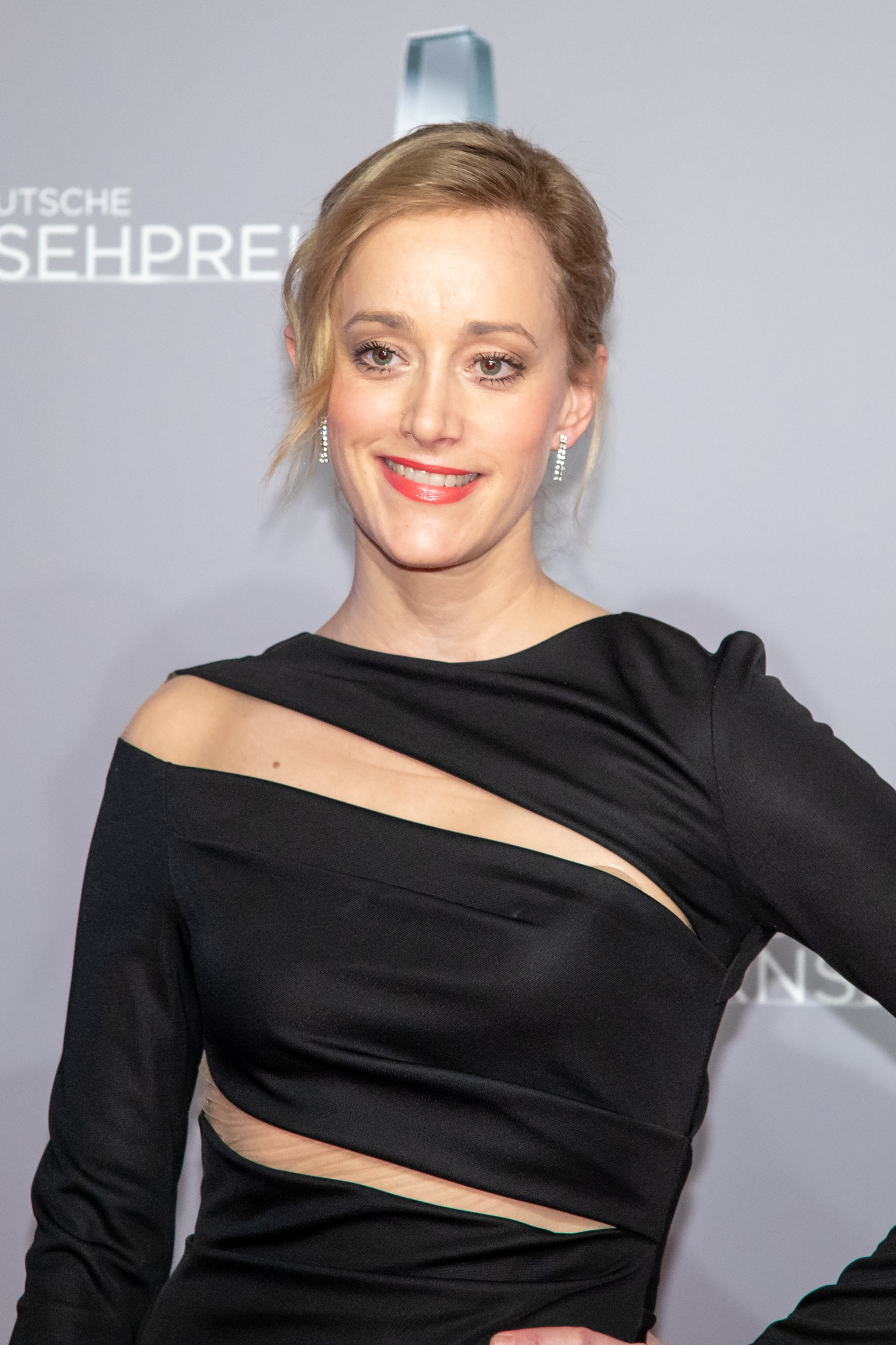 Judith Richter beim Deutschen Fernsehpreis 2019 in der Düsseldorfer Rheinterrasse